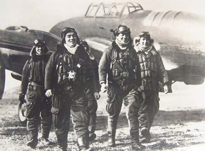 大日本帝国海軍エースパイロット遠藤幸男と乗機「月光」